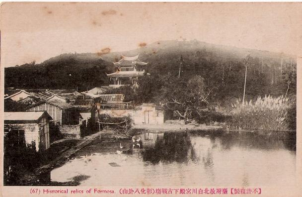 中文（台灣）: 日治時期彰化東門一帶與八卦山的風景。